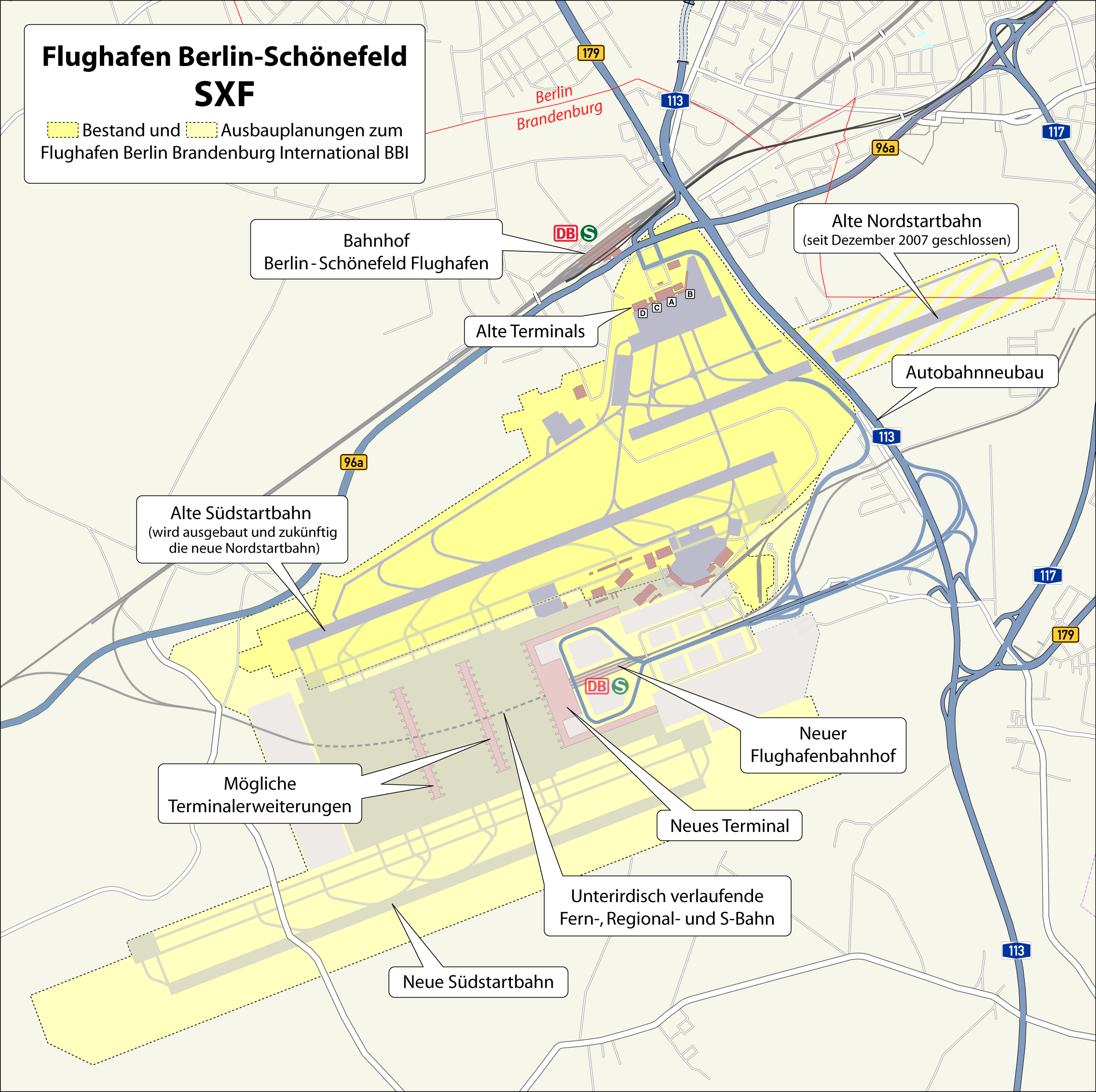 Karte: Flughafen Berlin-Schönefeld SXF mit Darstellung der Ausbauplanungen zum Flughafen Berlin Brandenburg International BBI